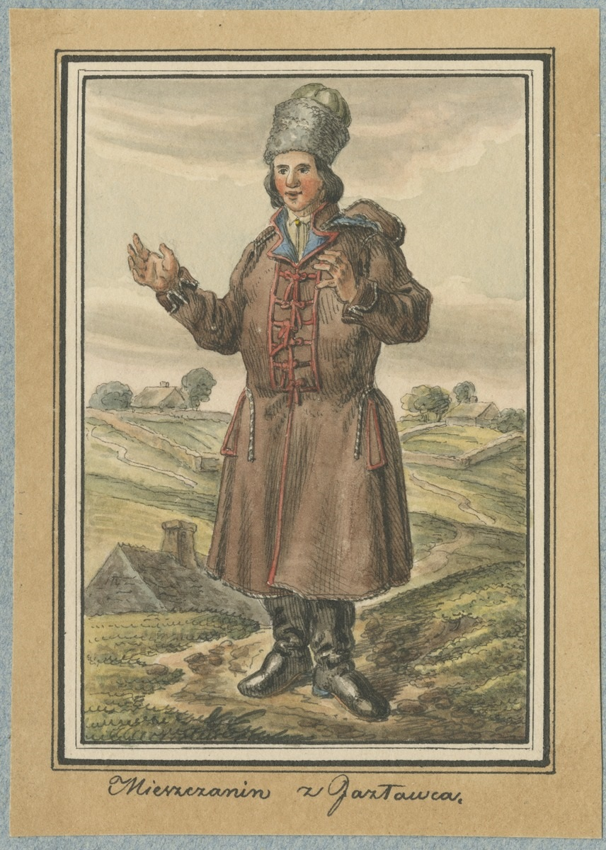 Міщанин з м. Язлівець 1836